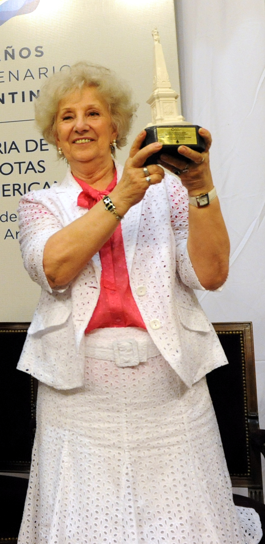 Estela de Carlotto, abuela de Plaza de Mayo